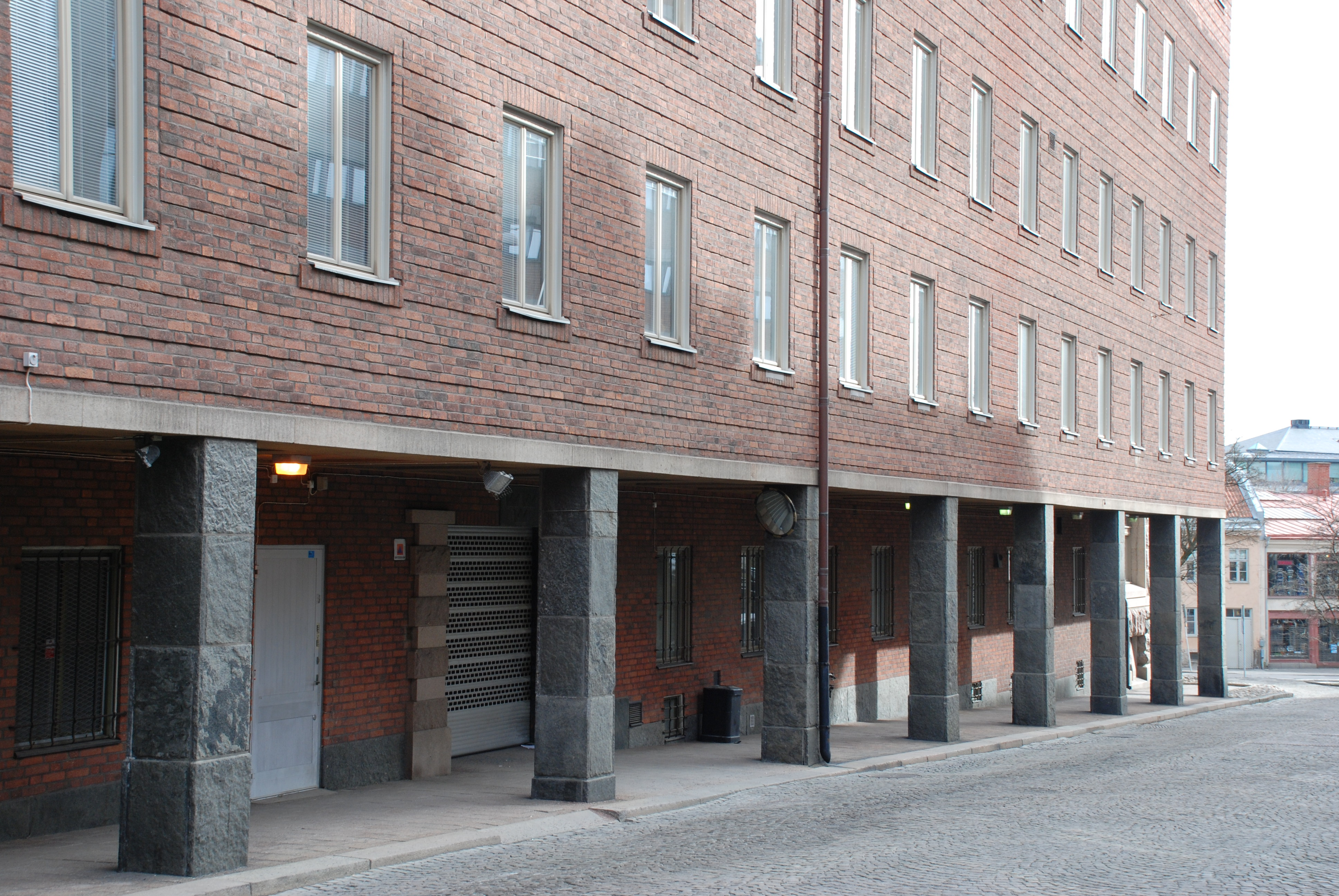 Kaserngränden vid Televerkets hus i Göteborg, nedanför Hvitfeldtsgatan i riktning mot Kaserntorget.